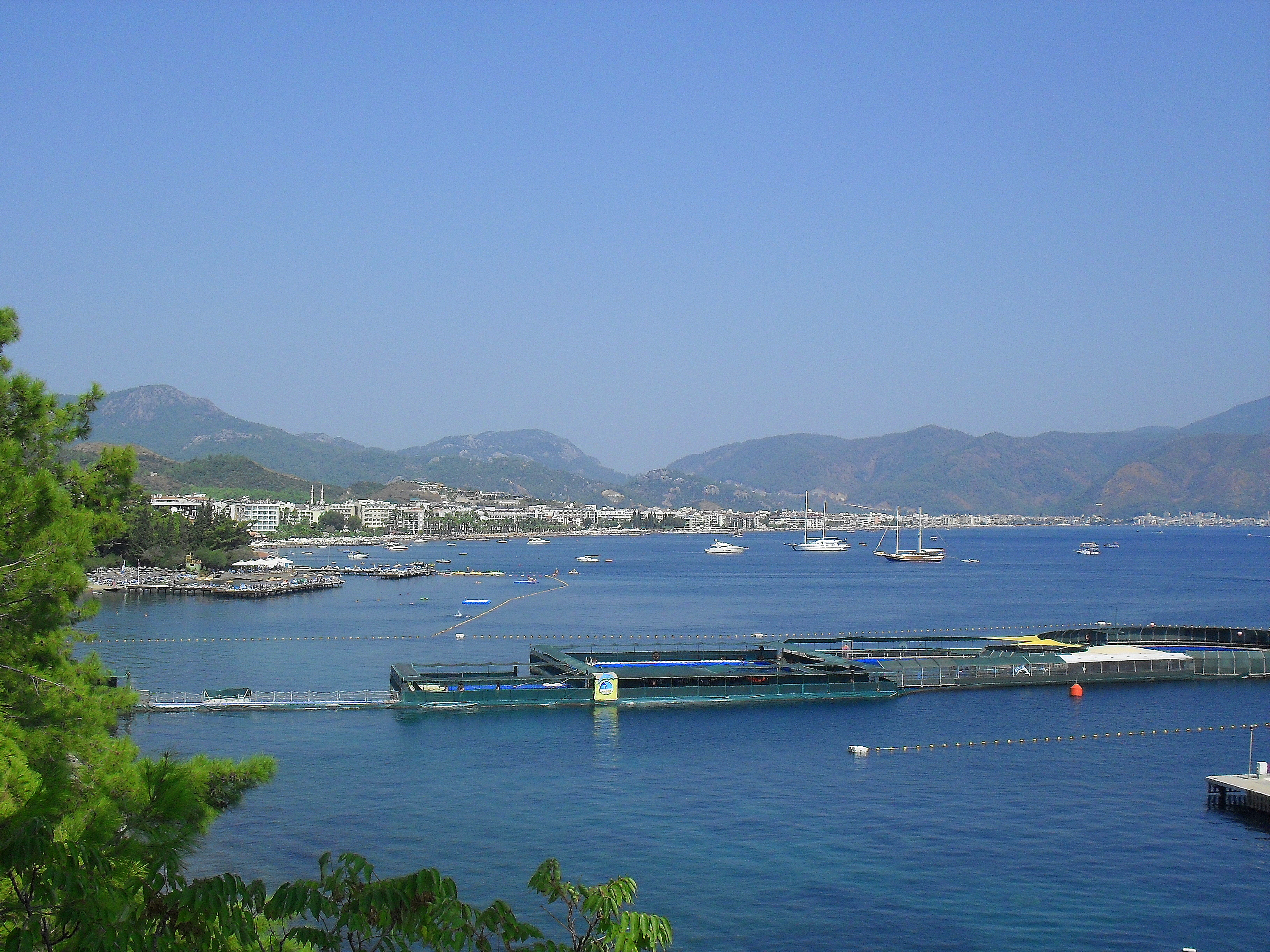 Marmaris, delfinarium